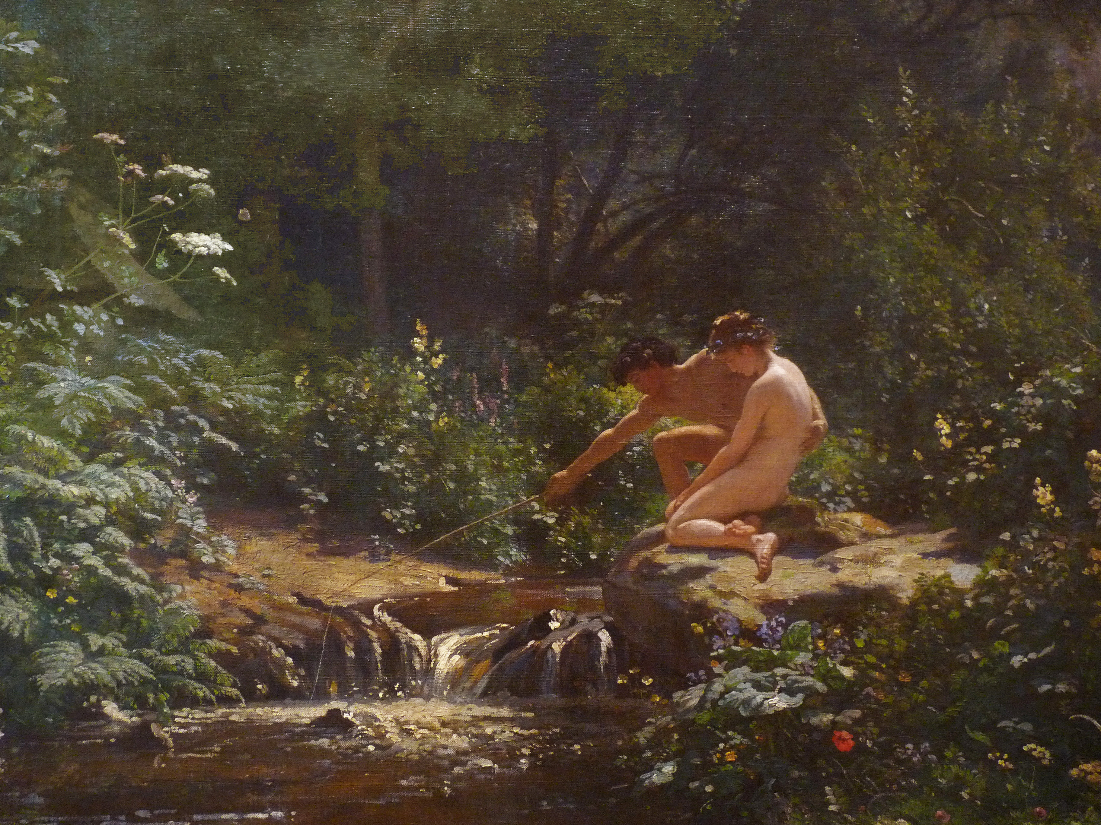 François-Louis Français, Paysage avec Daphnis et Chloé (détail), 1872, huile sur toile, musée d'Orsay, dépôt au musée des beaux-arts de Strasbourg en 1919.